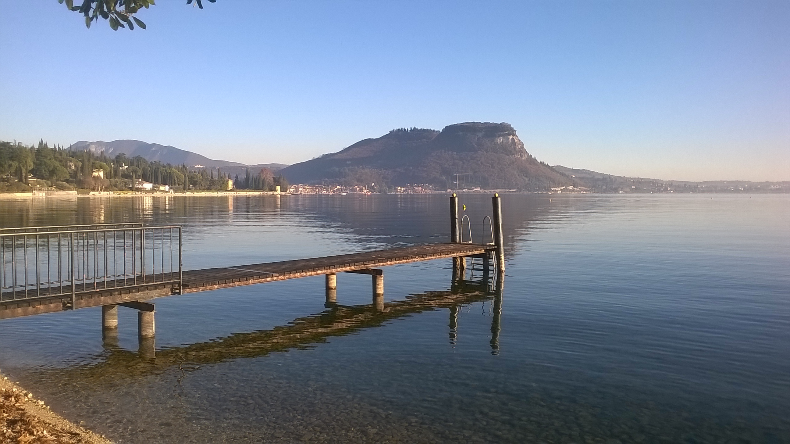 La Rocca e il golfo di Garda (vista da nord)